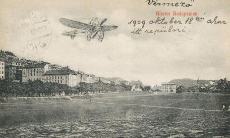 Louis Blériot budapesti repülése képeslapon.